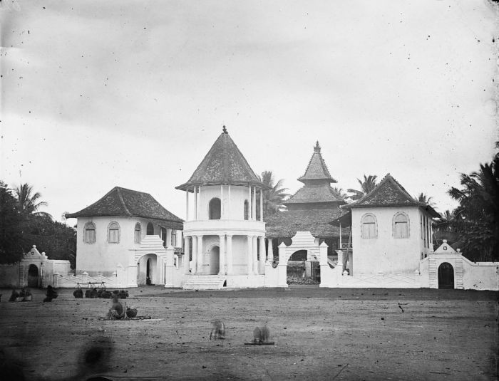 Negatief. Na 1500 wordt de islam op Java steeds invloedrijker en in de loop van de 16e eeuw worden de meeste steden en staten islamitisch. Dit wordt gesymboliseerd door de val van de Majapahit door toedoen van moslims in of rond 1527. Langs de noordkust van Midden-Java kwam een aantal islamitische stadstaten op die hun macht en aanzien voor een groot deel op handel baseerden. De meest succesvolle stadstaat was Demak. Het ontwikkelde zich gedurende korte tijd tot een territoriale staat van belang in Midden-Java. Daarnaast speelden ook Jepara, Pati (foto), Koedoes, Toeban, Grissee en Soerabaja een rol. (P. Boomgaard, 2001). Moskee, Indonesië